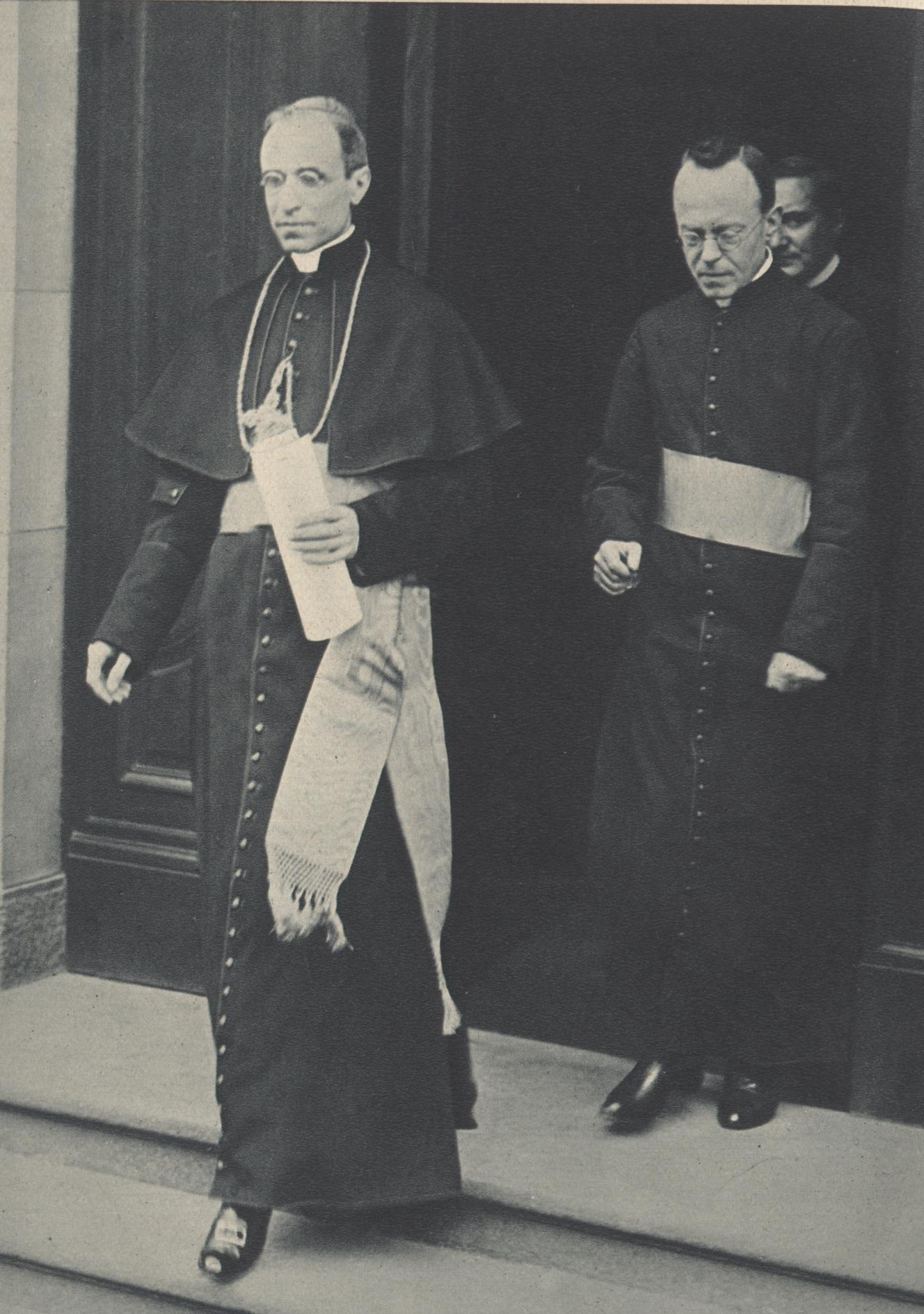 Nuntius Eugenio Pacelli (später Pius XII.) nach Abschluß des Preussischen Konkordates.